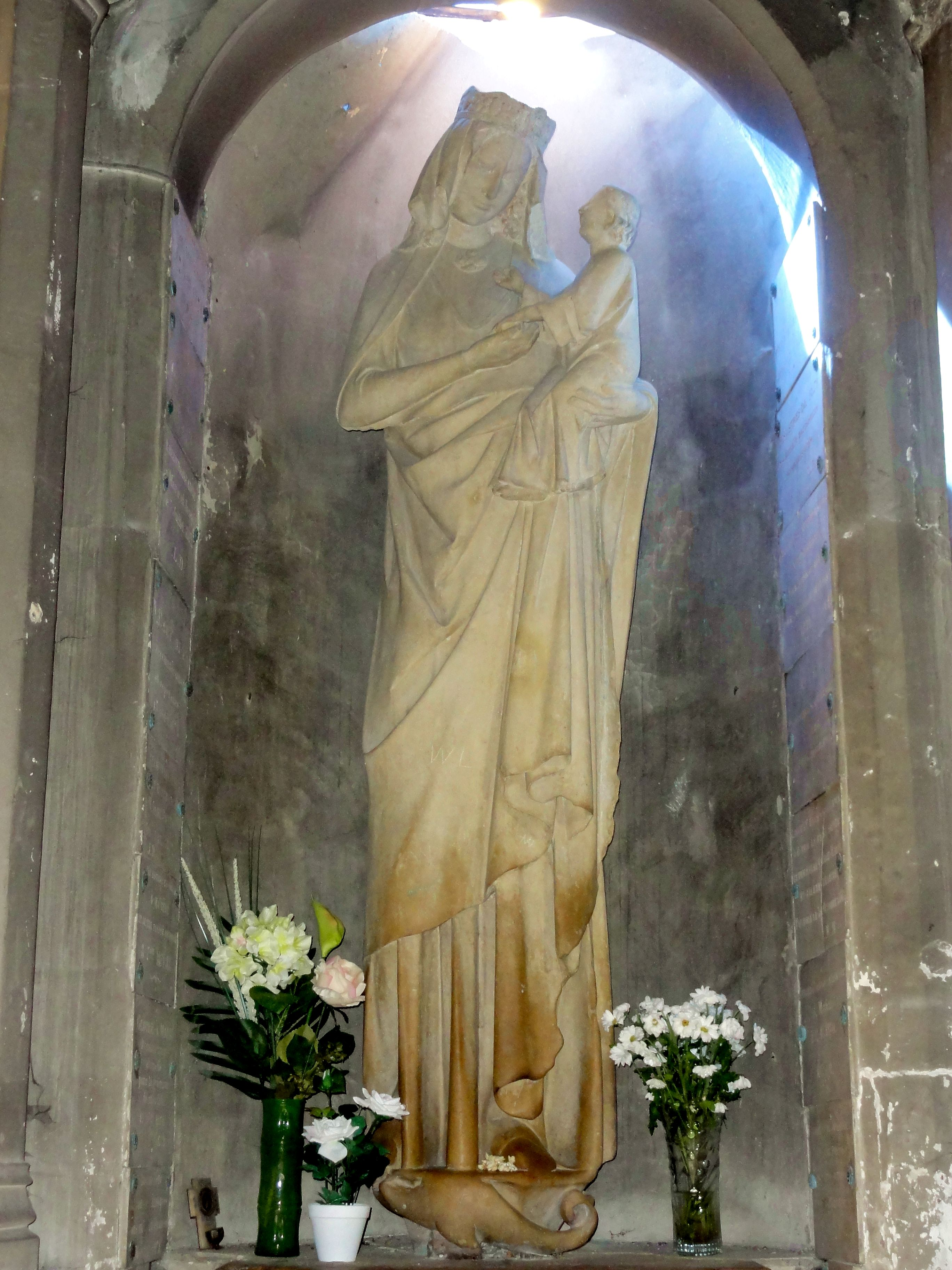 Statue de N.D. de Pontoise, XIIIe s.